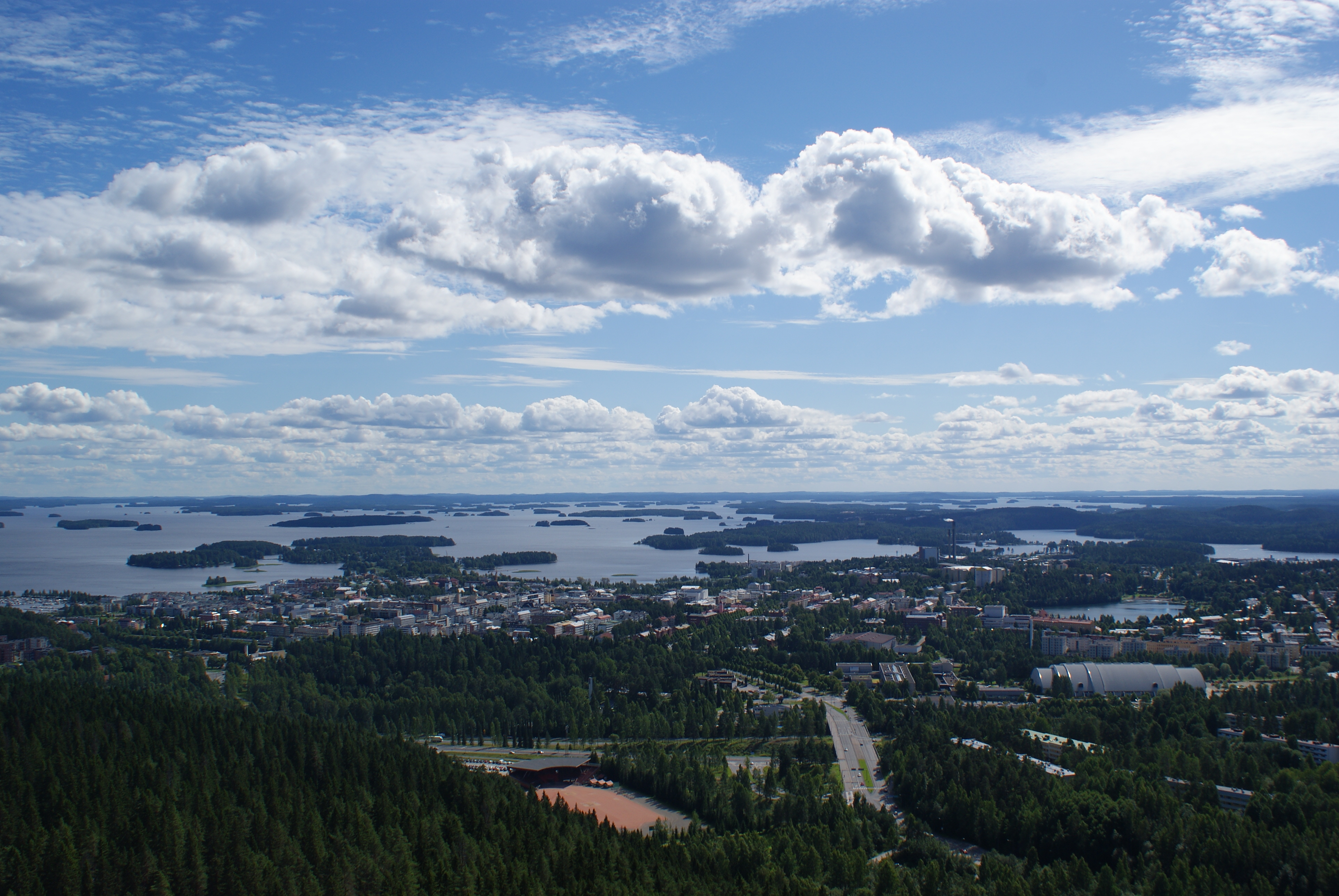 Kuopion keskustaa Puijon tornista kuvattuna